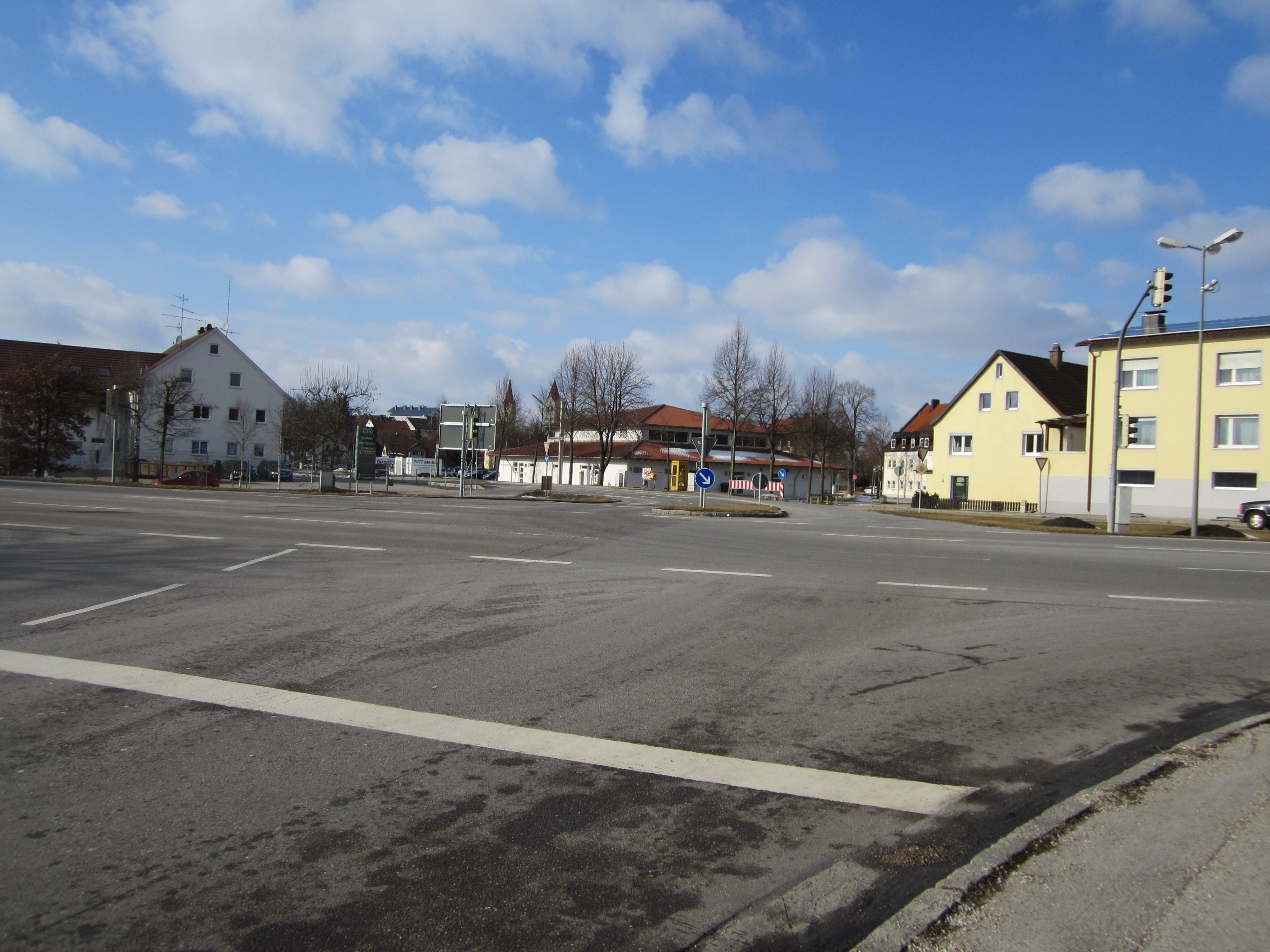 Auf dem Bild ist die Kreuzung der ehemaligen B 11 (jetzt St 2350) in Moosburg an der Isar zu sehen.